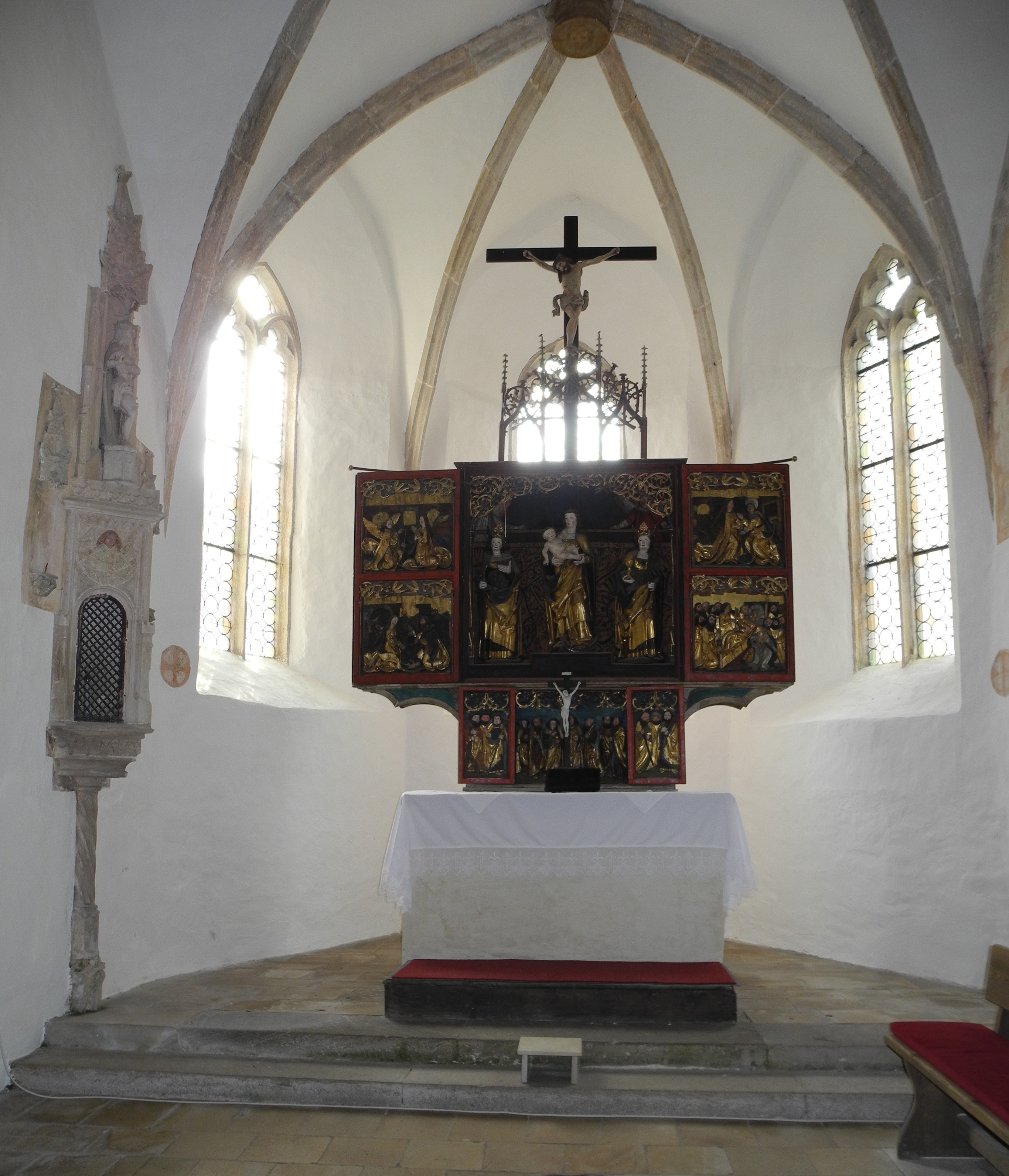 Pappenheim - St.Gallus-Kirche ab9.Jh